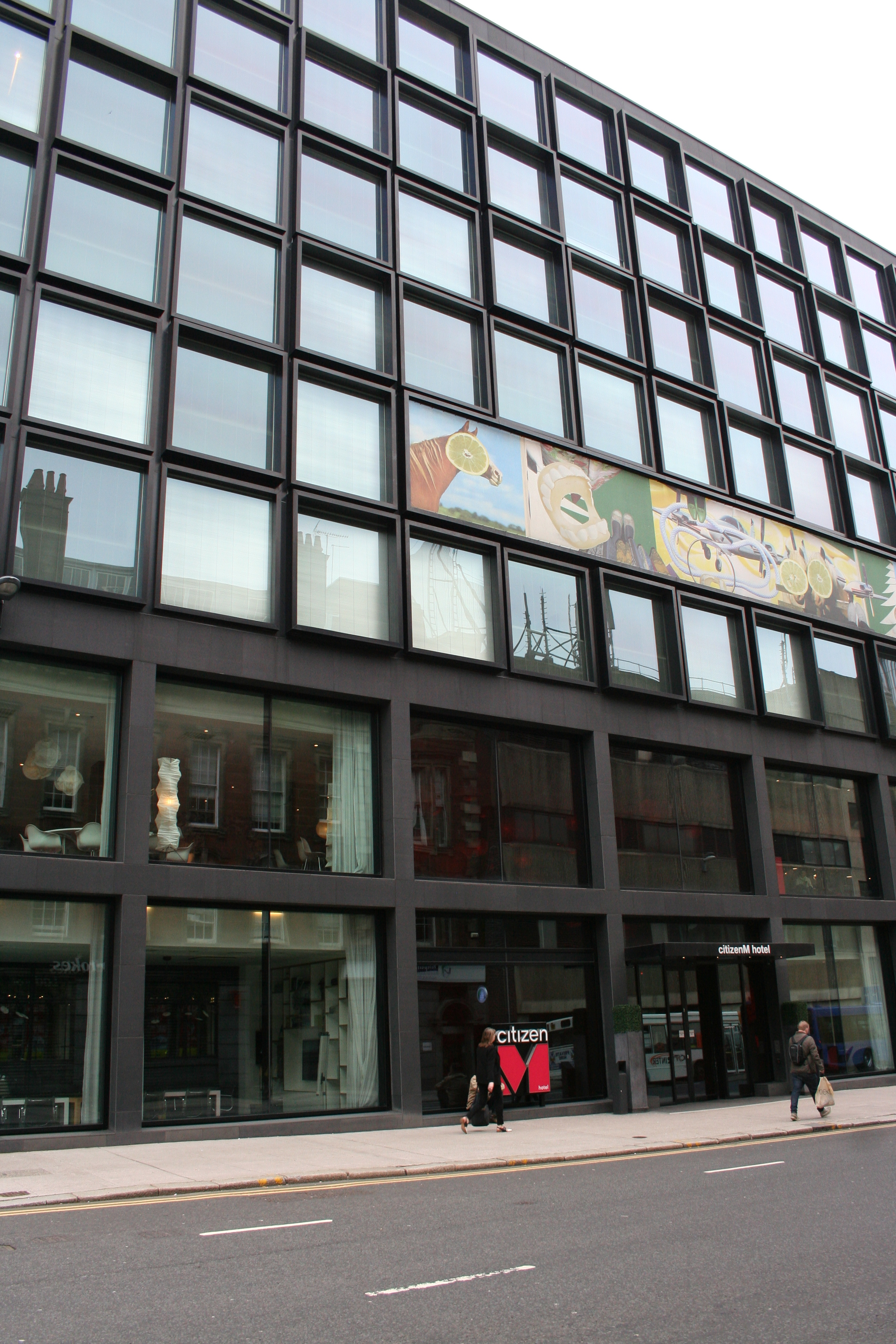 CitizenM Hotel Glasgow (60 Renfrew St, Glasgow, G2 3BW).